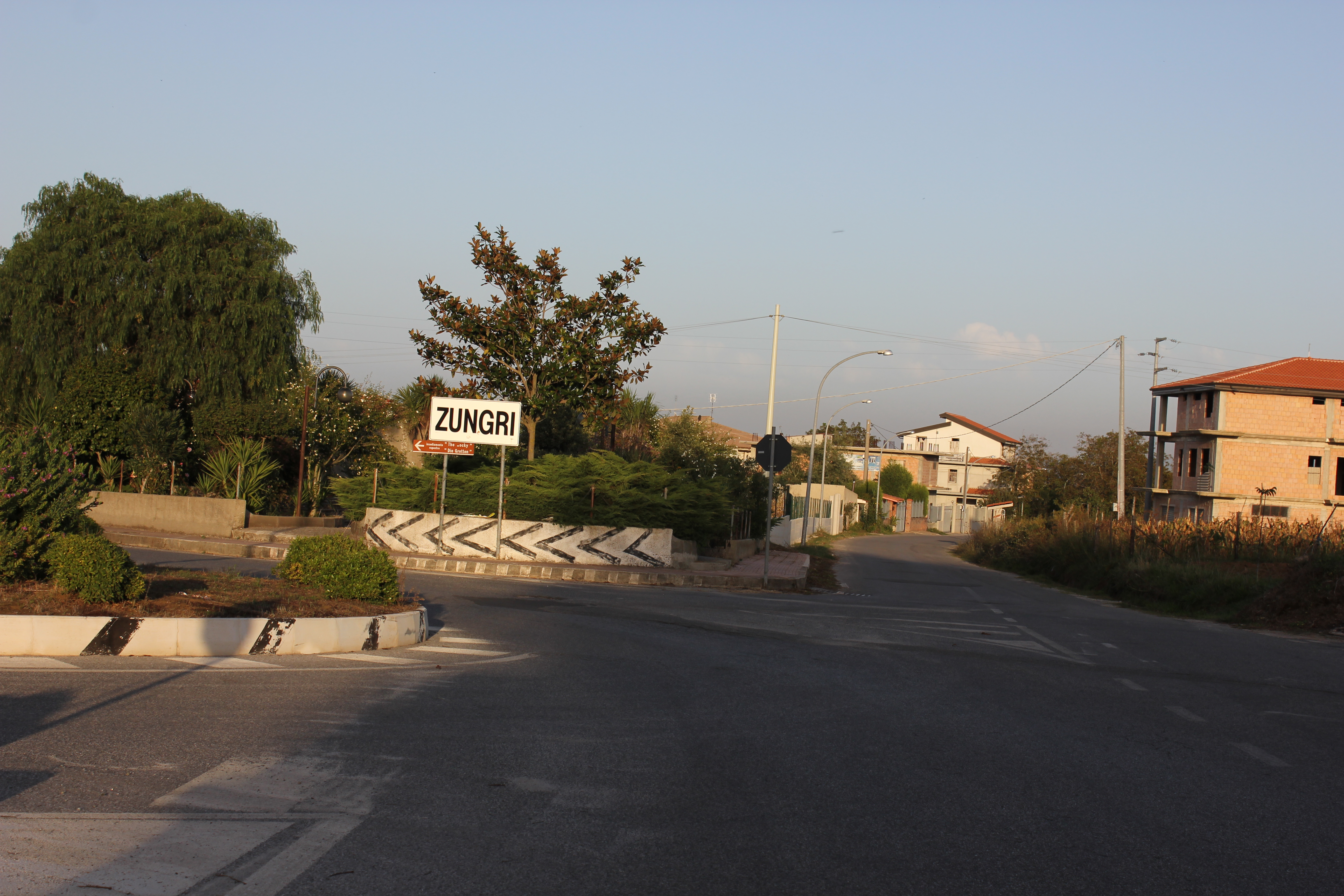 Entrada al pueblo de Zungri